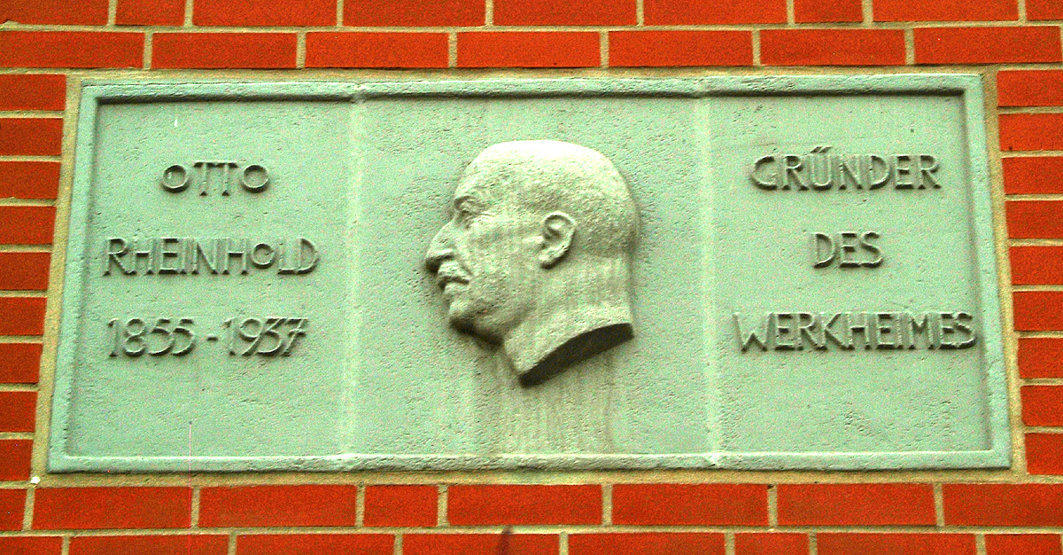 Gedenkplatte für den Gründer vom "Werkheim" in der Büttnerstraße, Otto Rheinhold (1855-1937).